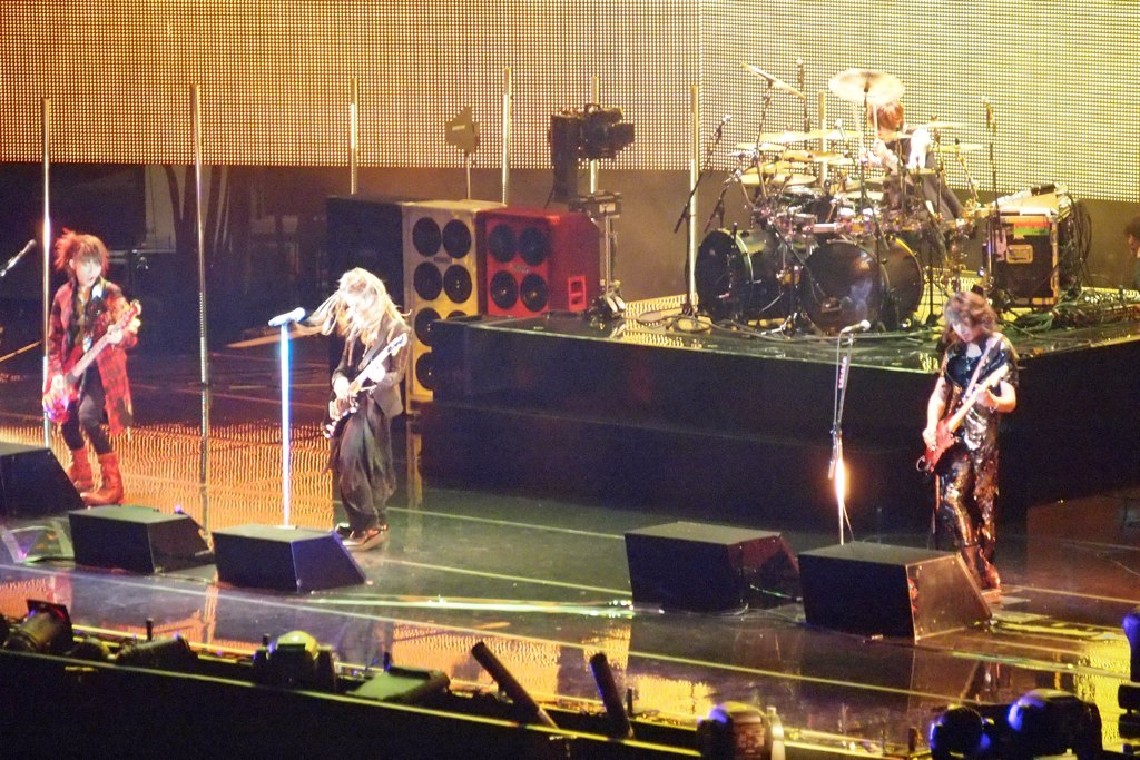 L'arc En Ciel @ MSG - 3/25/12 - 040